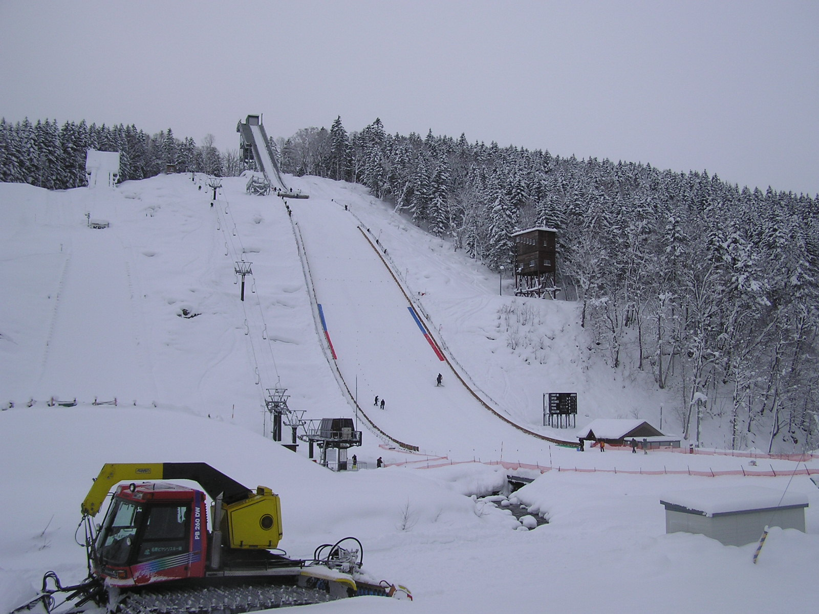 Piyasiri Schanze(名寄ピヤシリシャンツェ)スキージャンプ競技場